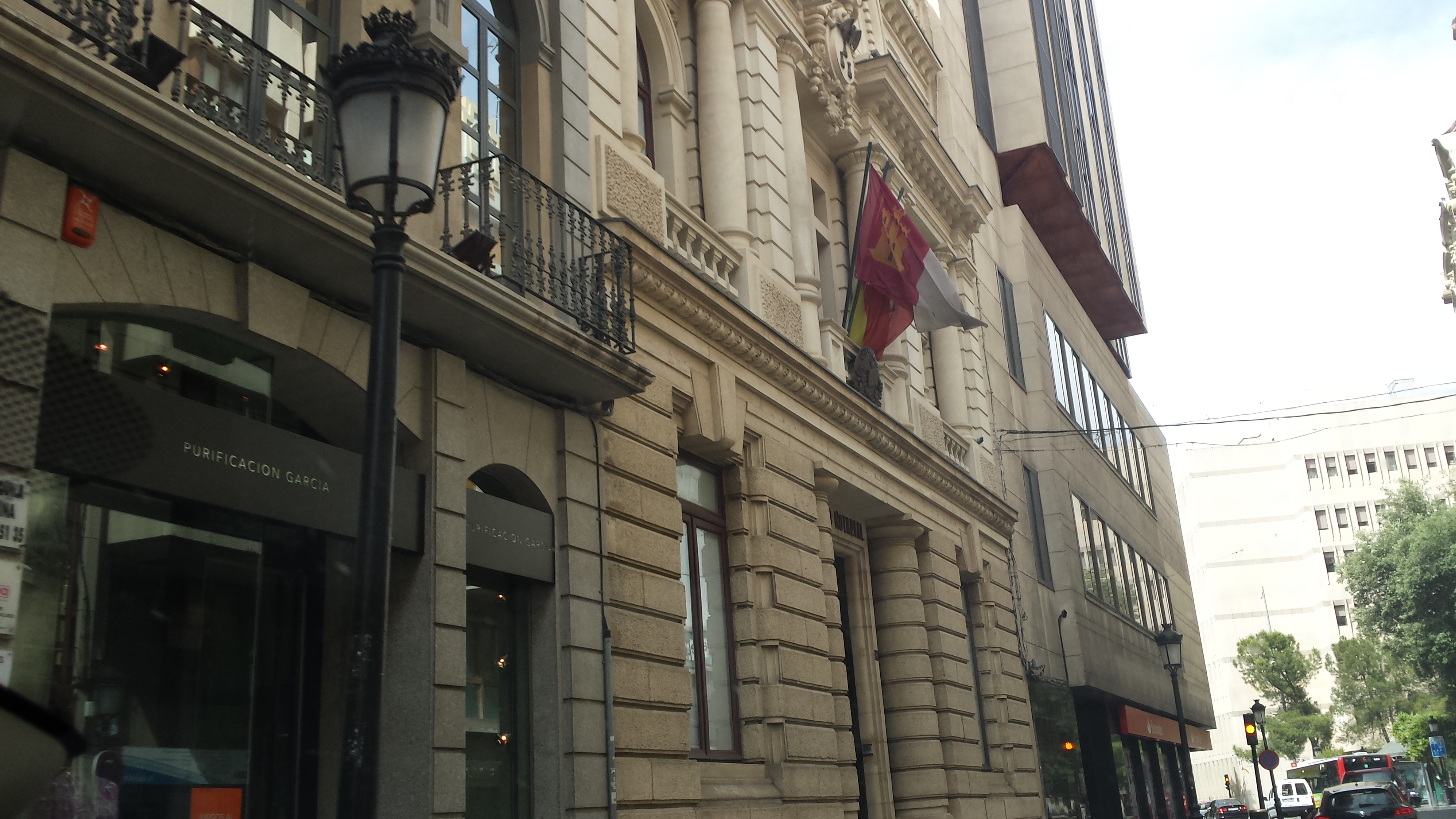 Ilustre Colegio Notarial de Castilla-La Mancha. Calle Ancha. Albacete